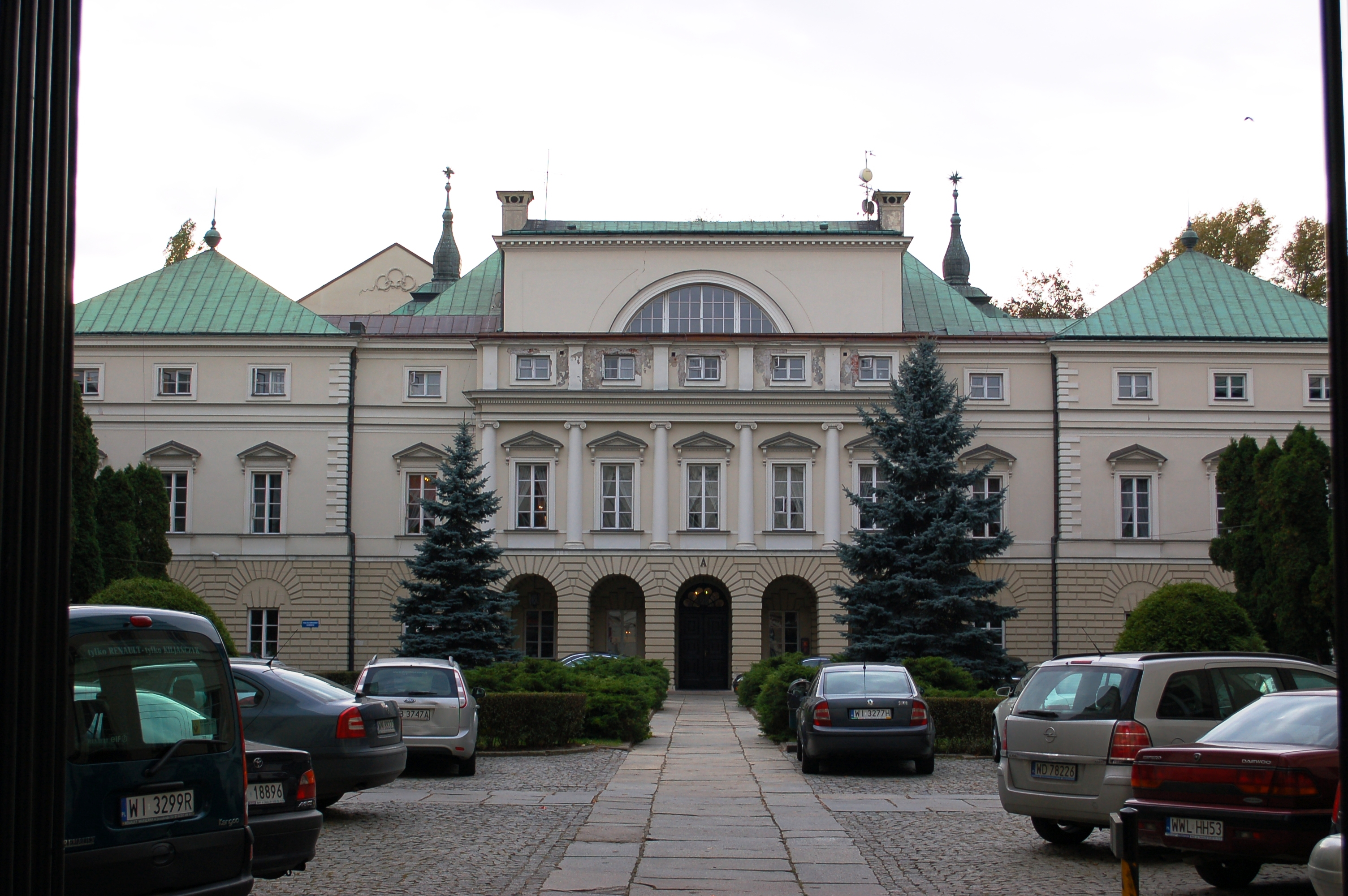 Miodowa street Warsaw